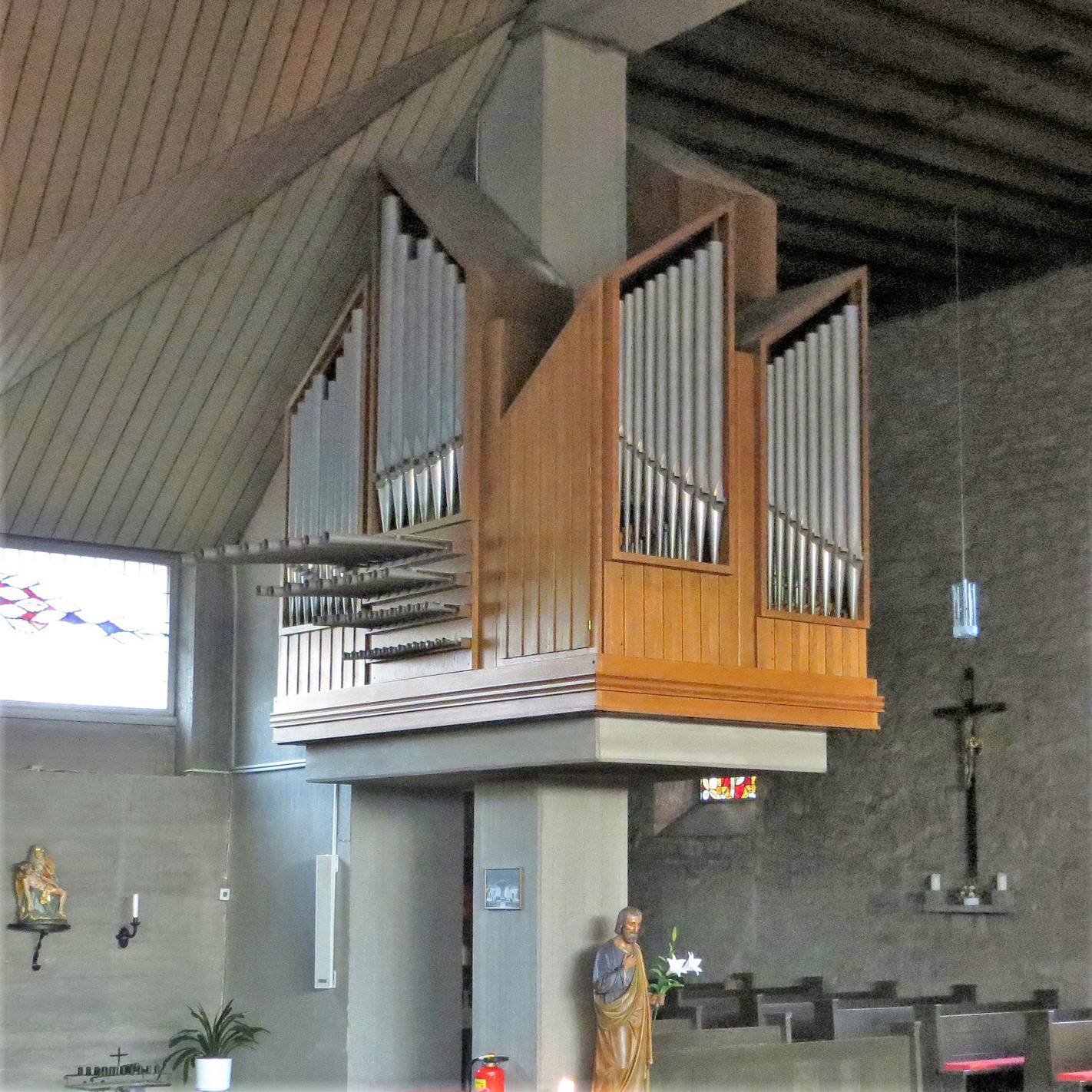 Orgelprospekt der katholische Kirche Mariä Geburt in Bexbach-Höchen, Saarpfalz-Kreis, Saarland.